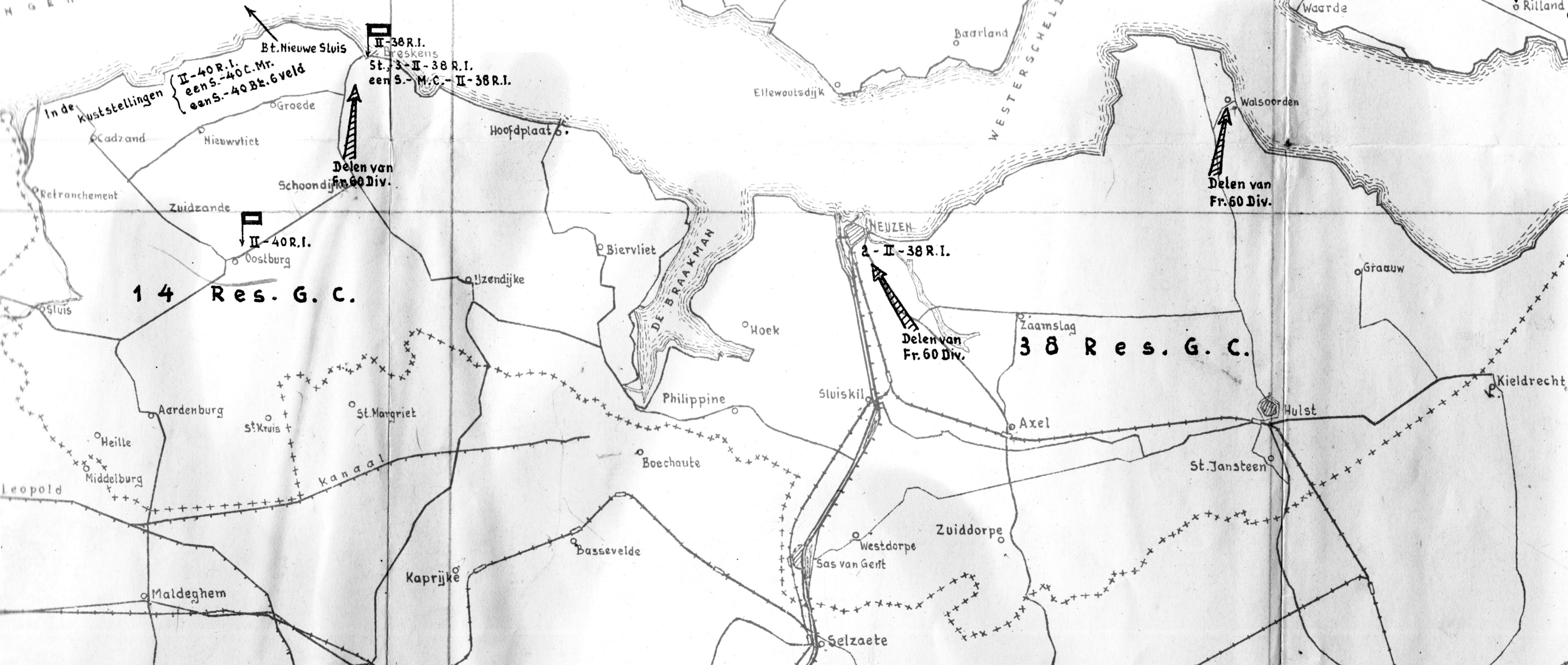 De strijd in Zeeland